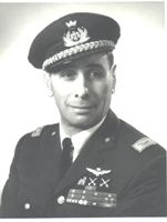 Giulio Cesare Graziani (Affile, 24 gennaio 1915 – Roma, 23 dicembre 1998)